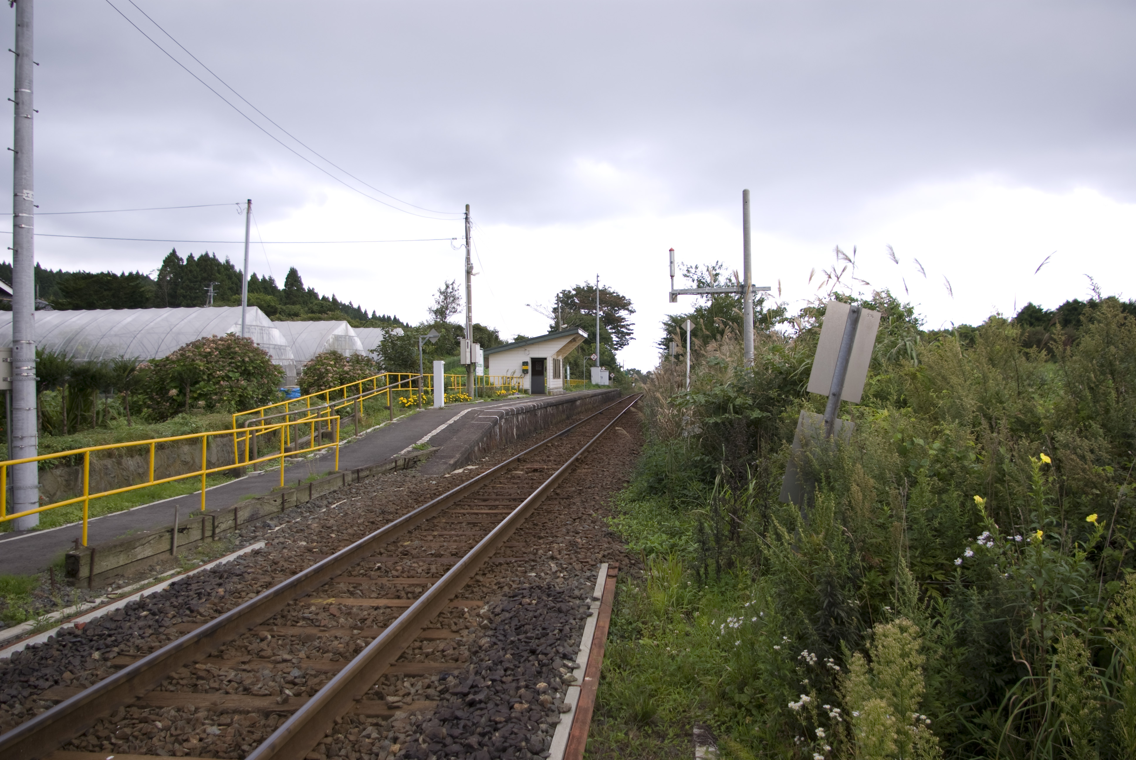 JR八戸線玉川駅